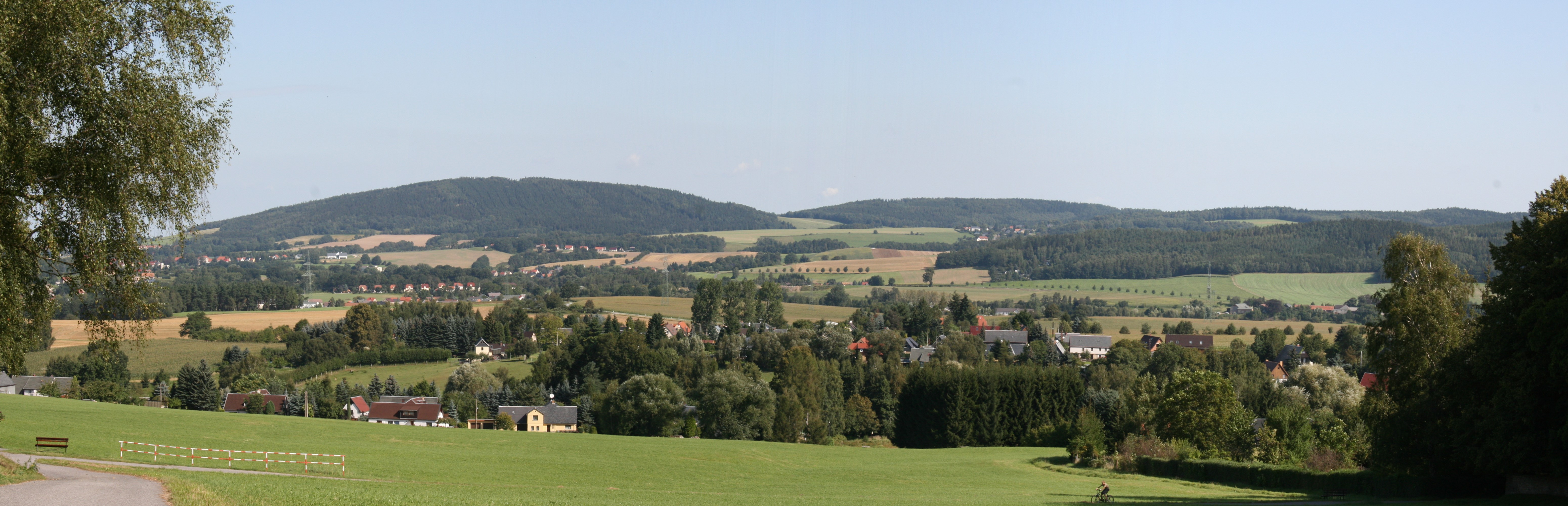 Blick in nördliche Richtung von Am Hohlweg in Crostau